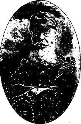 Le comte Wladimir de Pelleport, héros de la première guerre mondiale, qui vivait au château de Champlevrier à Chiddes (Nièvre)